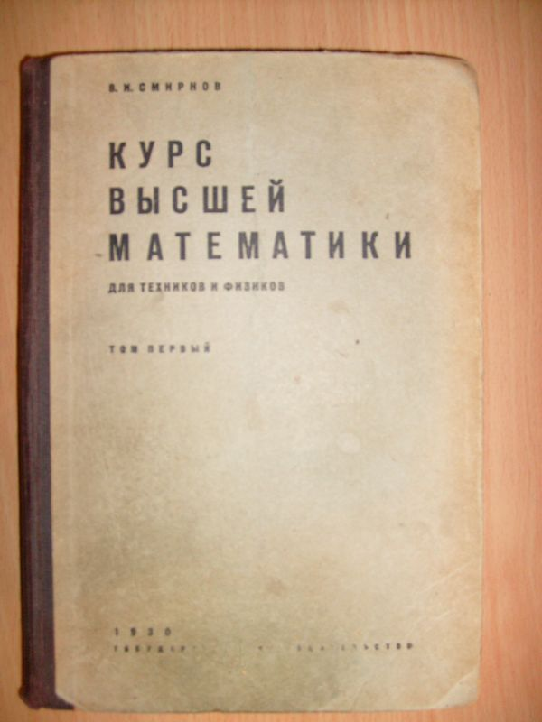 Смирнов В. И., курс высшей математики, том 1, 1930 год